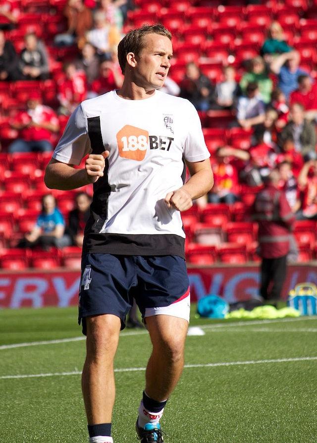 Kevin Davies